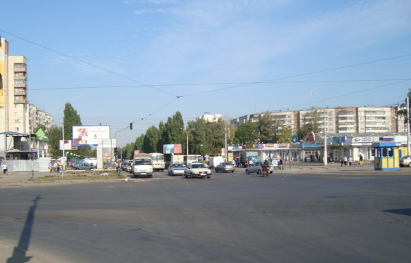 проспект 60 лет СССР (Липецк)